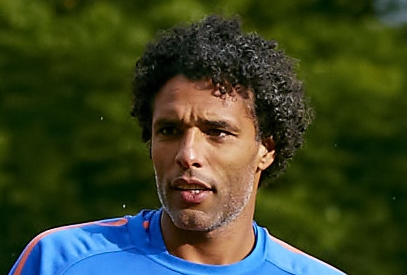 Pierre van Hooijdonk tijdens de ING Ballenjongens en -meiden Selectiedag bij Spartaan ‘20 in Rotterdam op 31 augustus 2012.